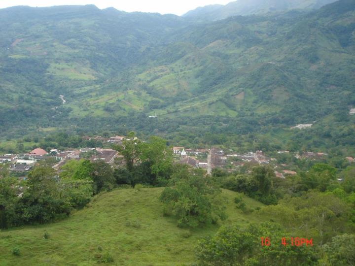 Vista Panoramica de Simacota, desde una montaña cercana.